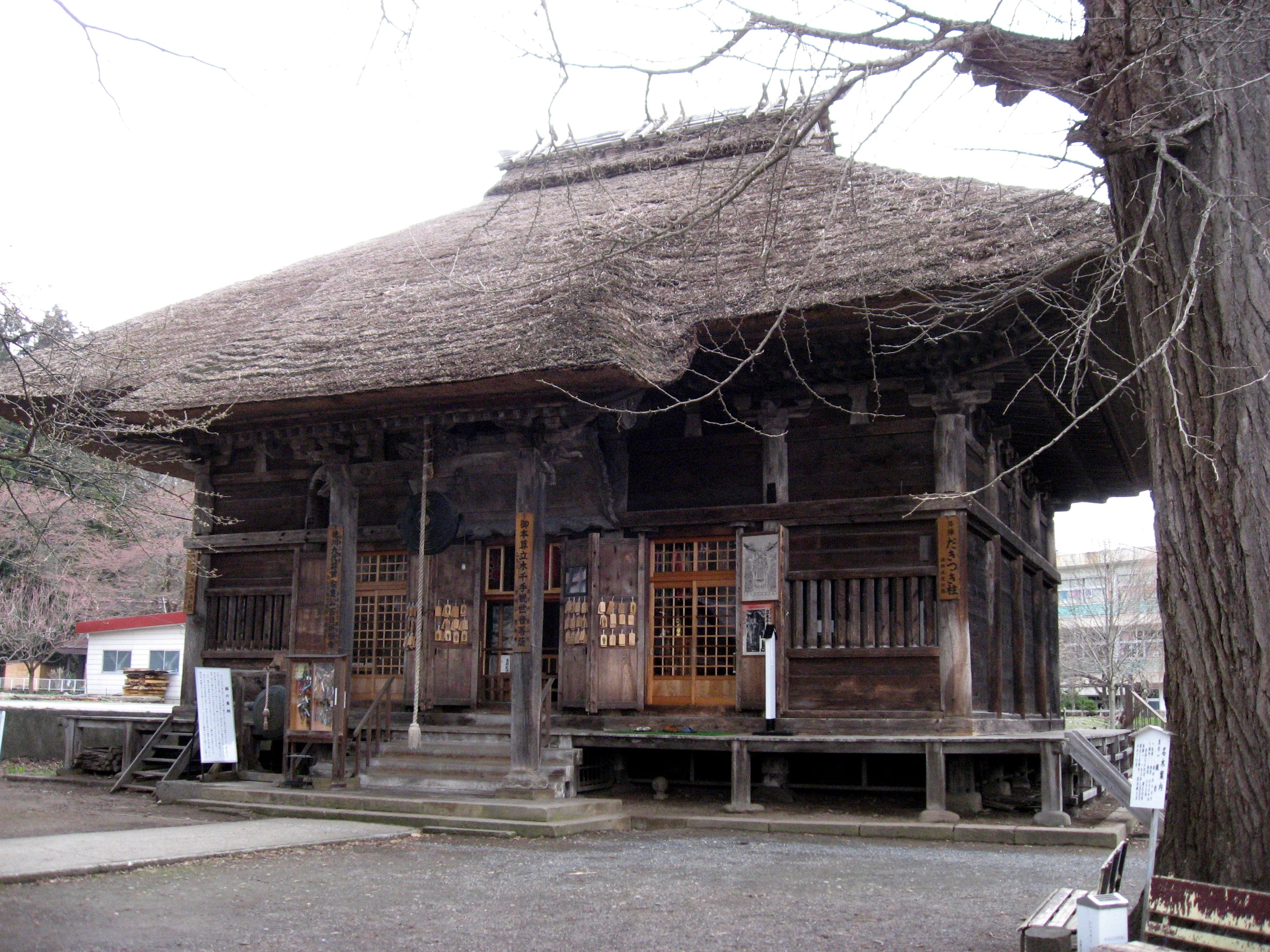 恵隆寺観音堂.JPG